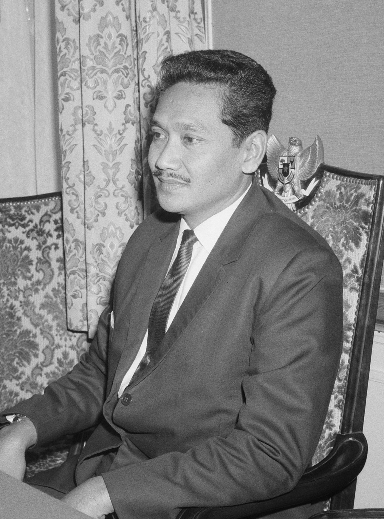 Persconferentie in de Indonesische ambassade te Den Haag gegeven door de minister-stafchef van de luchtmacht van Indonesië, Omar Dhani. Omar Dhani kwam naar eigen zeggen op werkbezoek, maar het gerucht ging dat hij ontslagen zou zijn vanwege zijn aandeel in een mislukte staatsgreep